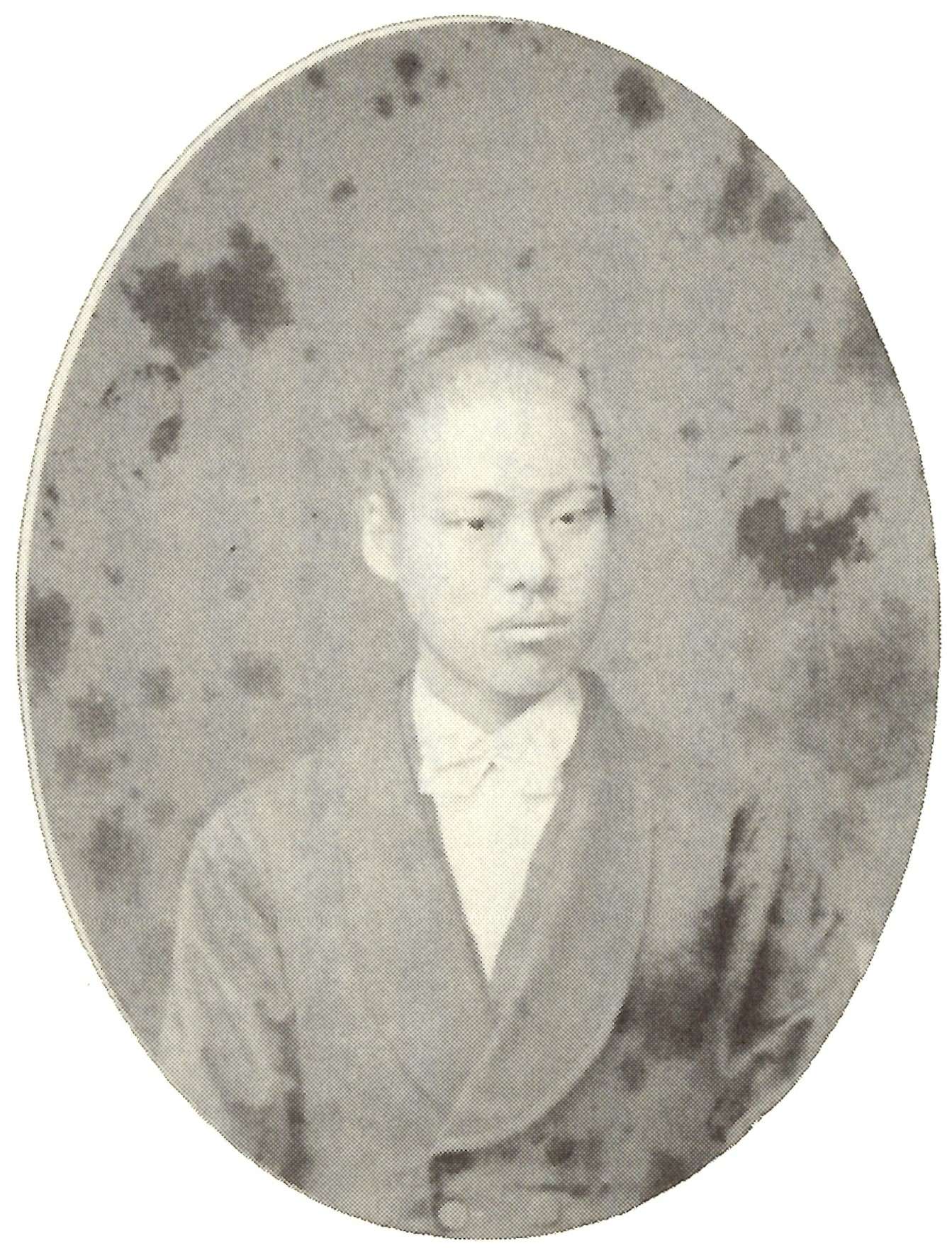 竹内惟忠の肖像写真。